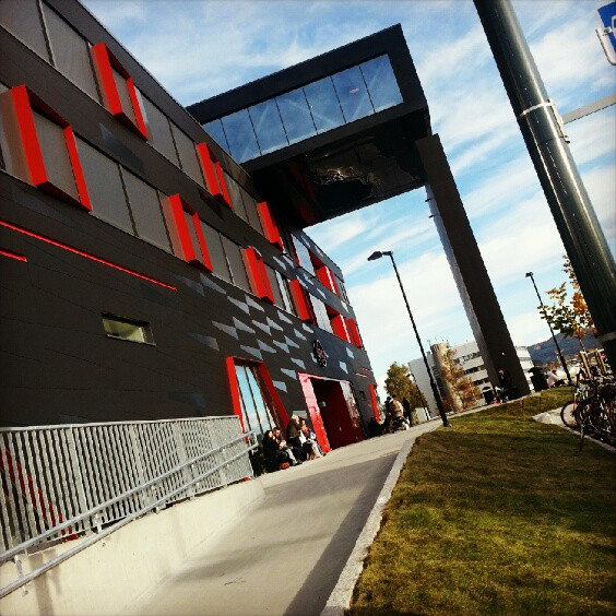 Sirkus Shopping i Trondheim